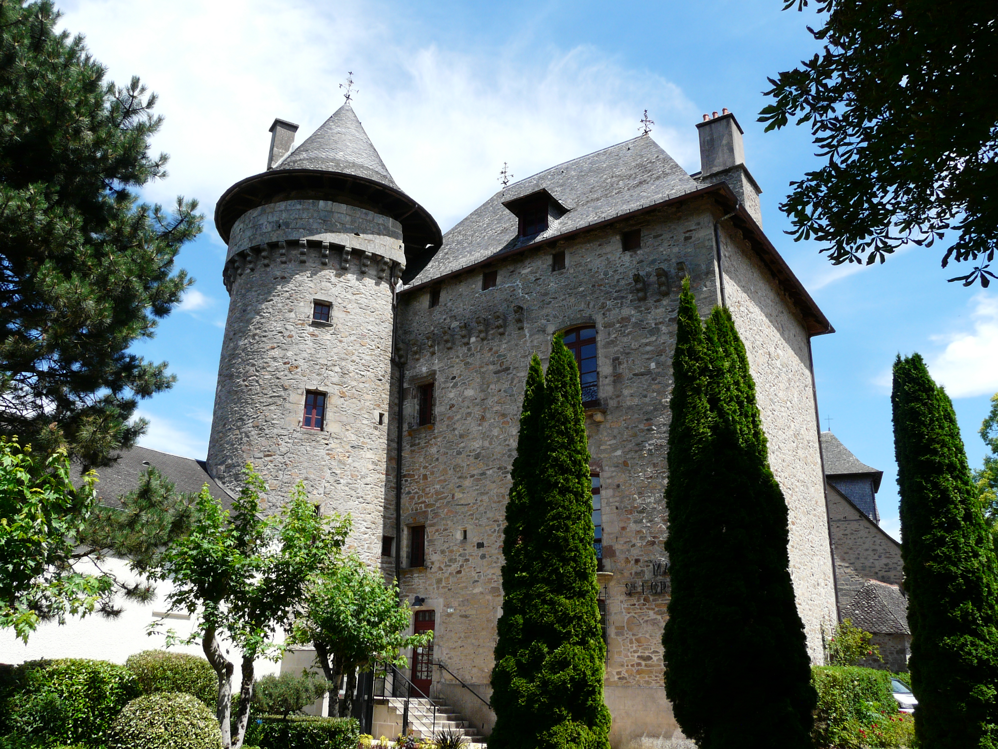 Le château de Sainte-Fortunade, Corrèze, France.